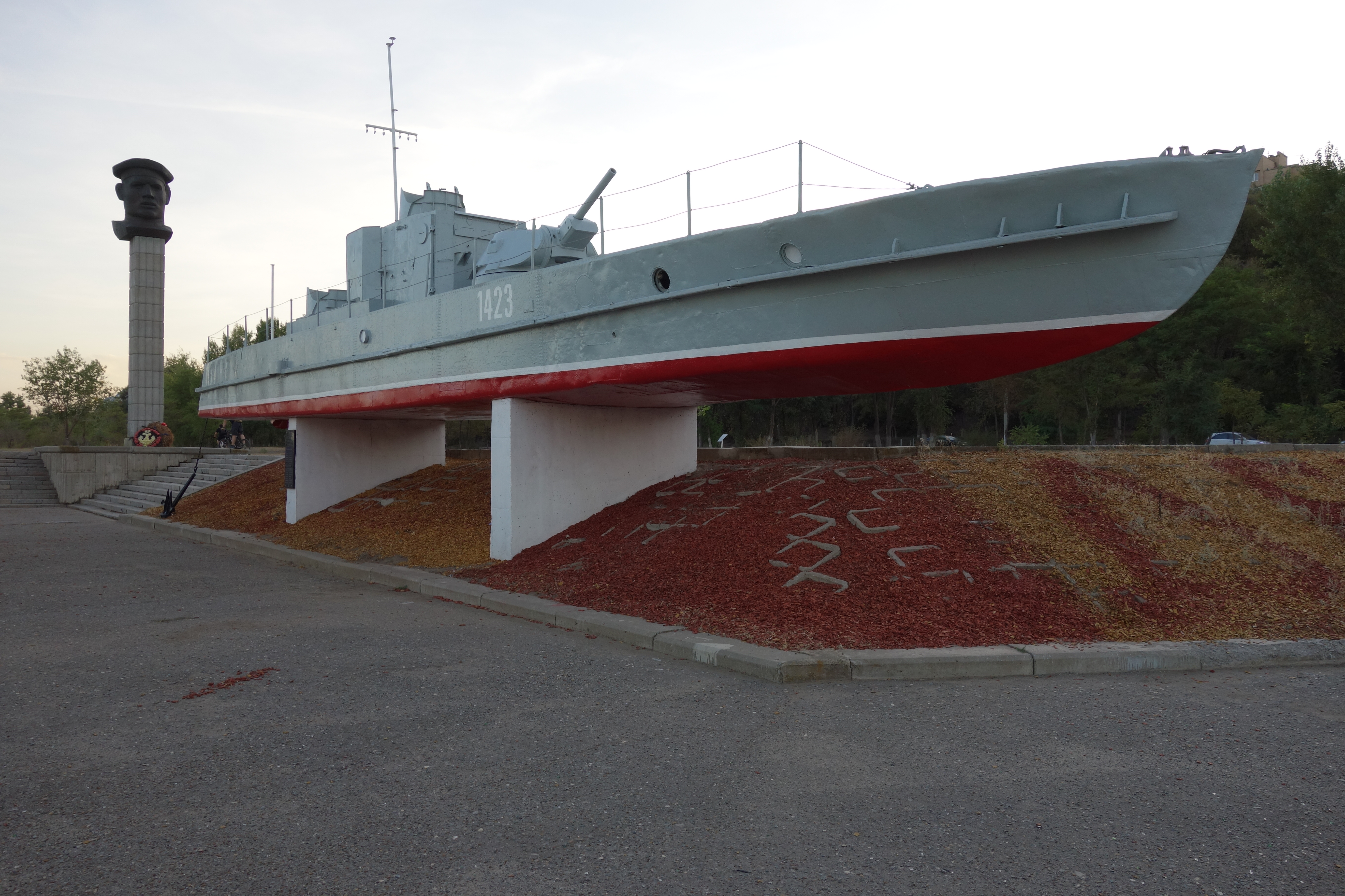 Бронекатер БК-13 и мемориал, установленный в честь речников Волжской военной флотилии: на берегу р. Волги, в районе музея-панорамы «Сталинградская битва», Центральный район, Волгоград, Волгоградская область